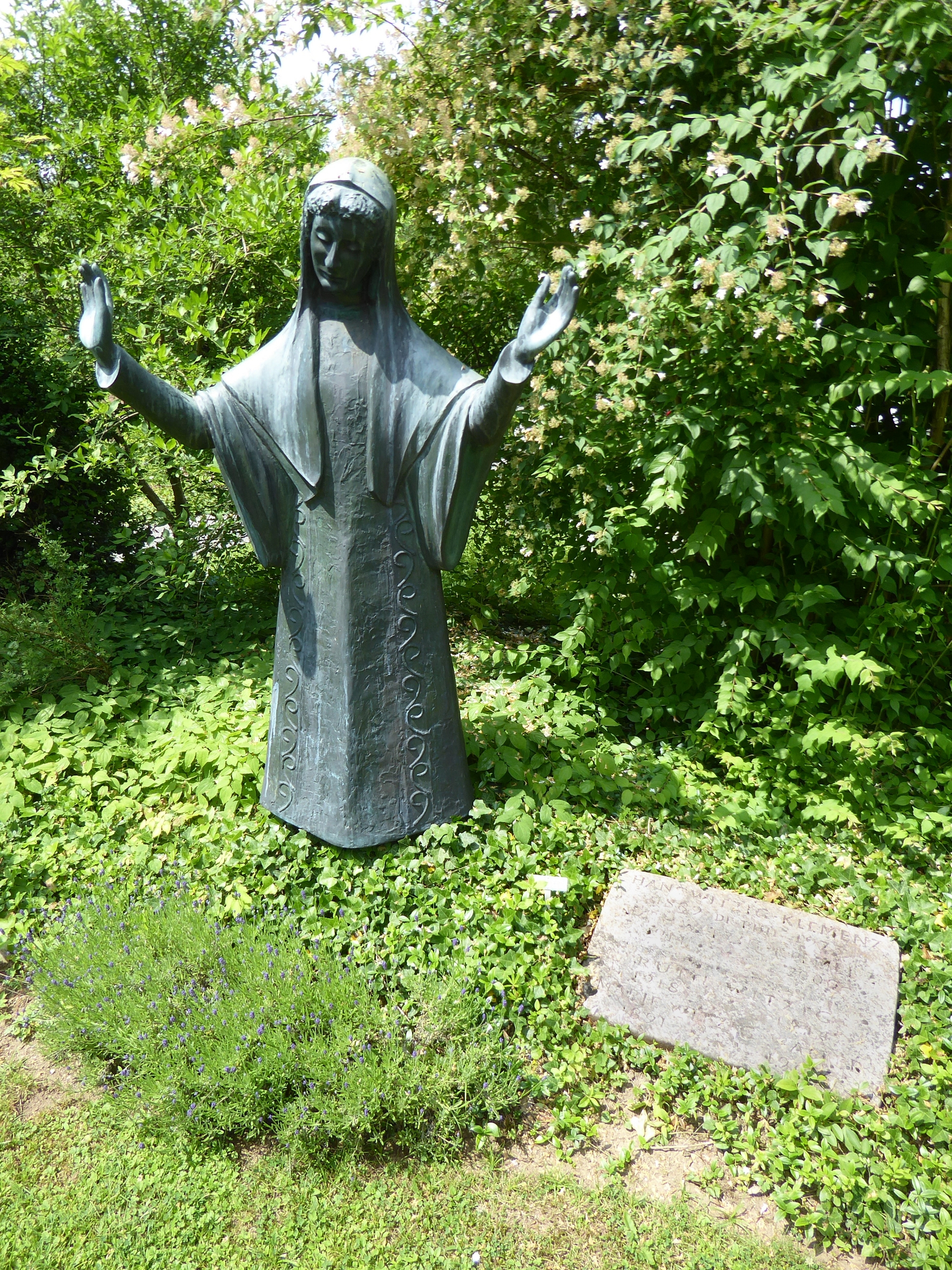 Hans Witzig-Klemenz (1889–1973) Schweizer Kunsthistoriker, Plastiker, Illustrator, Grafiker und Autor. Grab Friedhof Witikon, Zürich